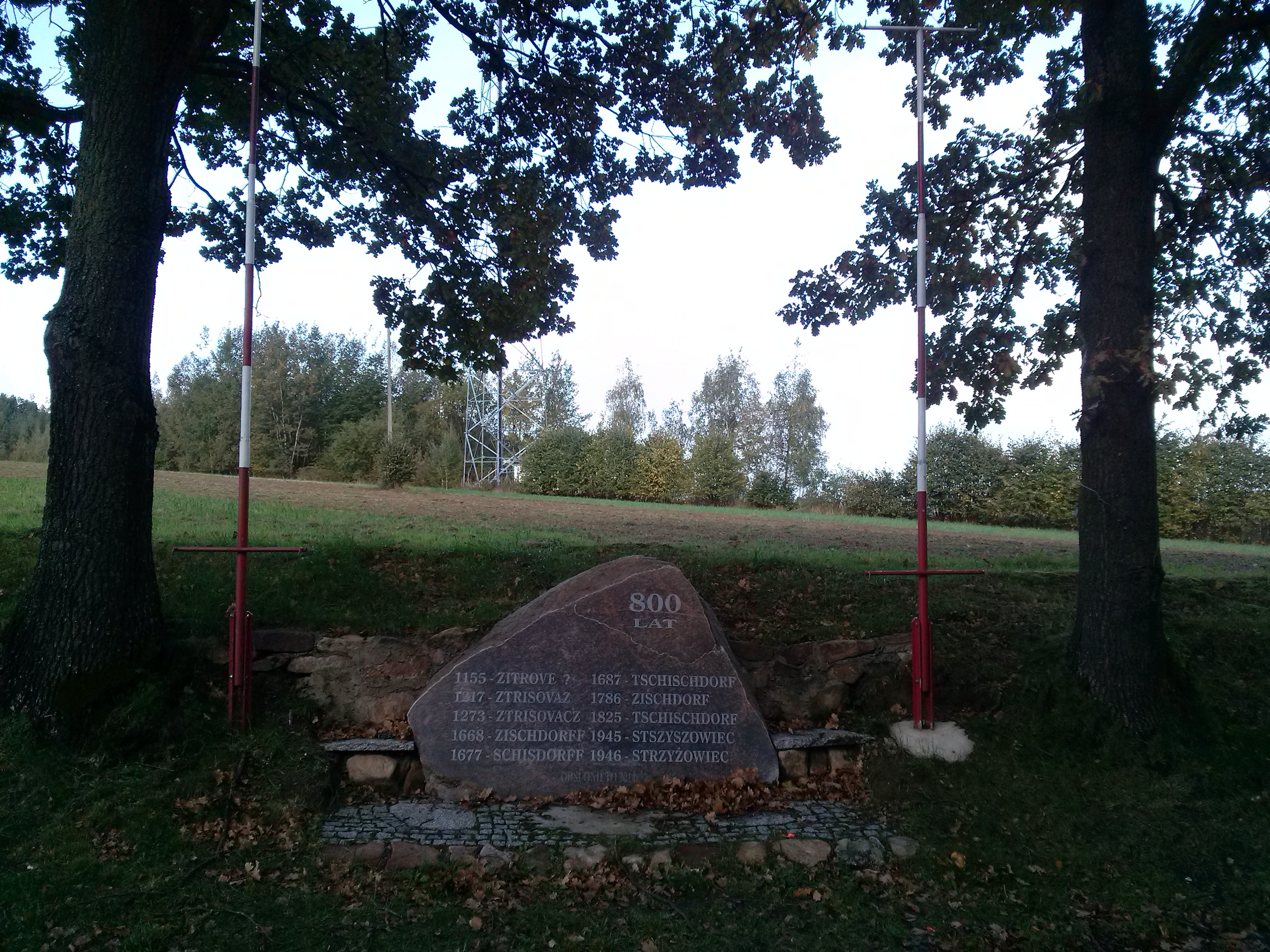 Głaz pamiątkowy 800 lat Strzyżowca wzdłuż drogi powiatowej 2491D